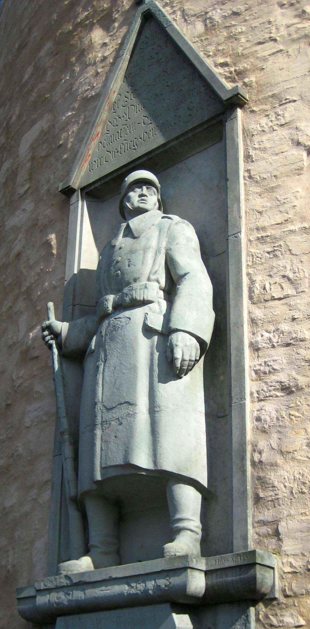 Kriegerdenkmal von 1922 an der Westseite des Bucksturms in Osnabrück aus Anröchter Dolomit, Entwurf von Hermann Hosaeus (1875-1957). Das Denkmal ist den Angehörigen des Infanterie-Regiments „Herzog Friedrich Wilhelm von Braunschweig“ (Ostfriesisches) Nr. 78 gewidmet